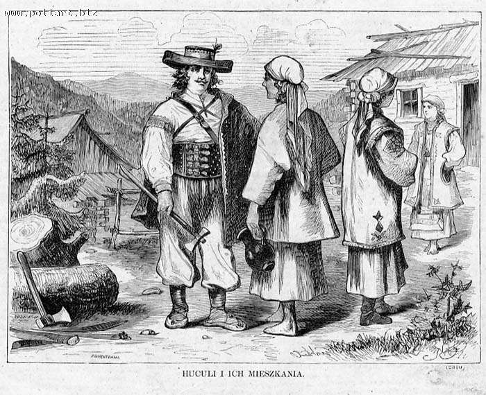 Східні гуцули: Малюнок з натури.Східна Галичина